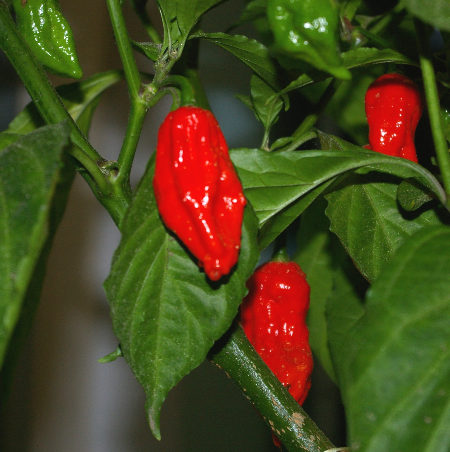 Reife und grüne Bhut Jolokia